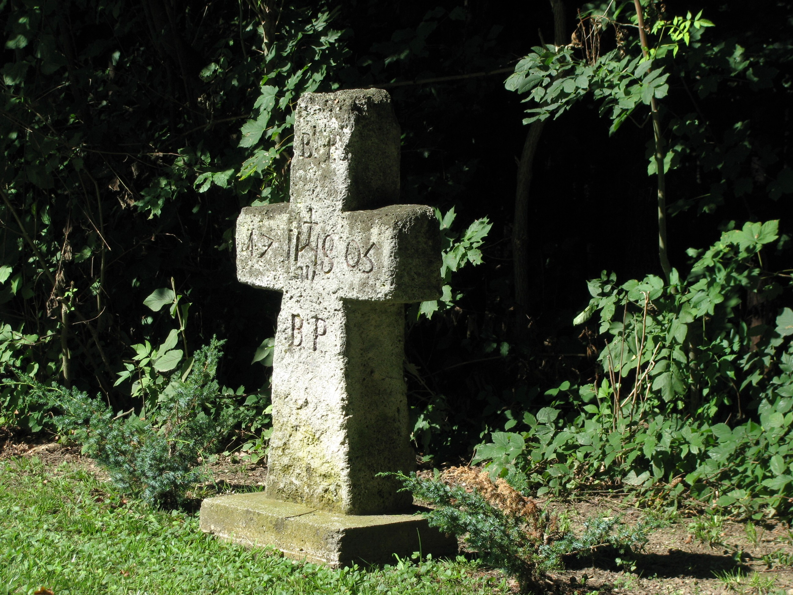 Gedenkkreuz, kleines Tuffsteinkreuz, bez. 1705; neu aufgestellt an der Bundesstraße 11.This is a photograph of an architectural monument.